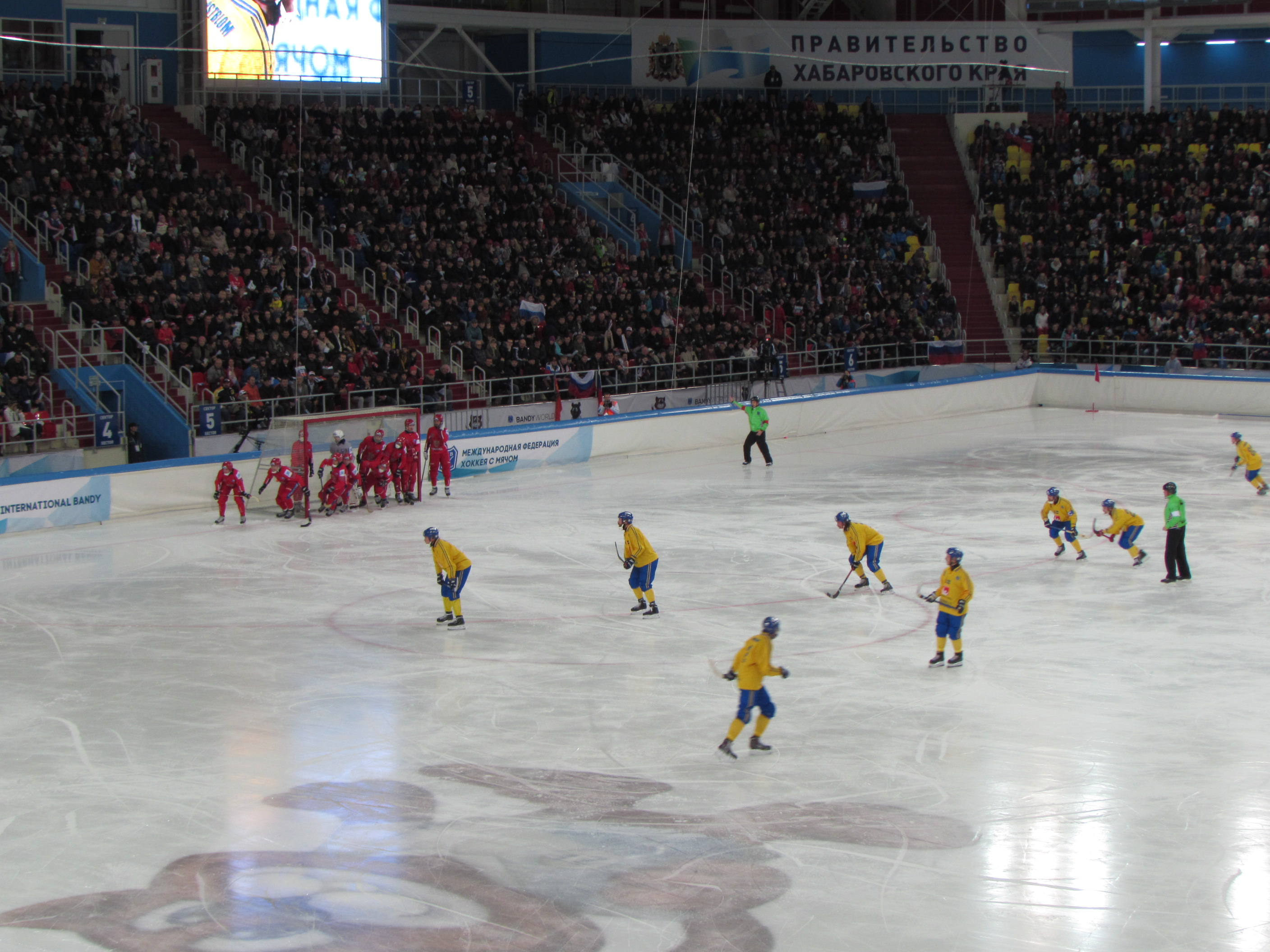 Фінал Росія – Швеція 2015 р. в Хабаровську